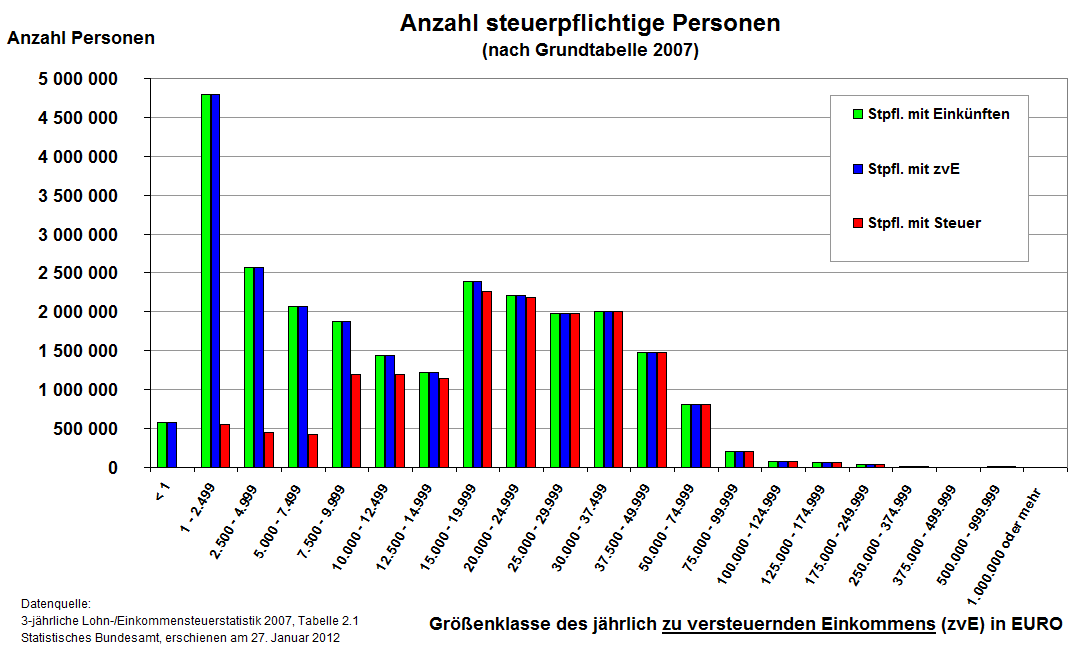 Steuerpflichtige Personen (Grundtarif) in Deutschland nach Einkommensgruppen (Dreijährliche Lohn- und Einkommensteuerstatistik 2007, Tabelle 2.1, Fachserie 14 Reihe 7.1, erschienen am 27. Januar 2012)